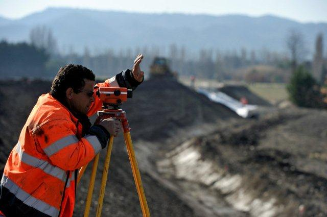 Digue Païsses Perspective Théodolite